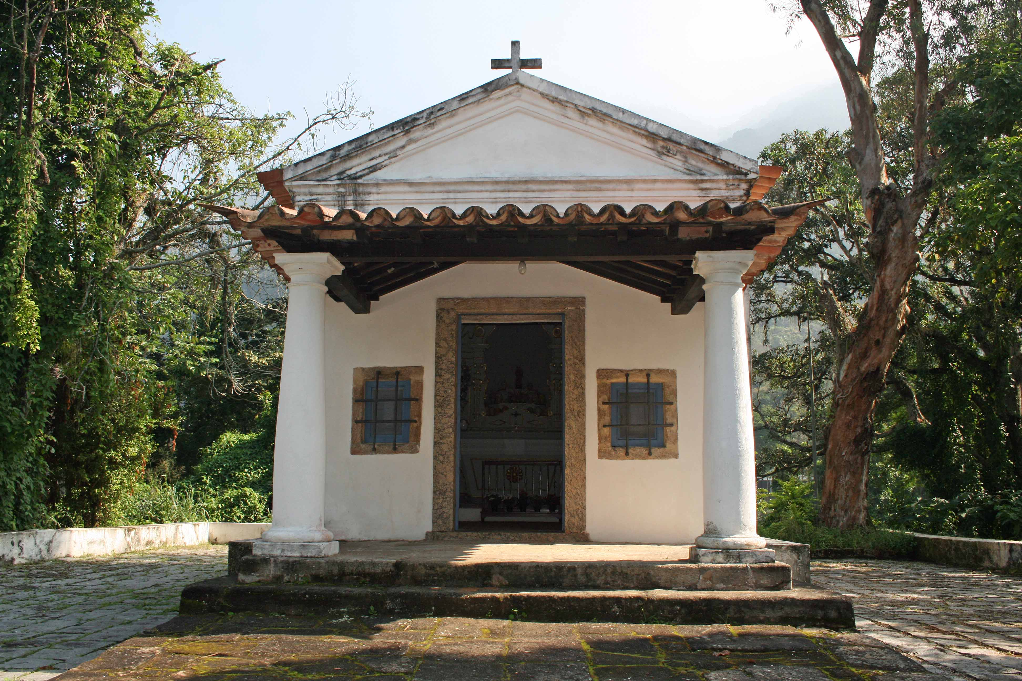 Capela de Nossa Senhora da Cabeça (1603/1607)